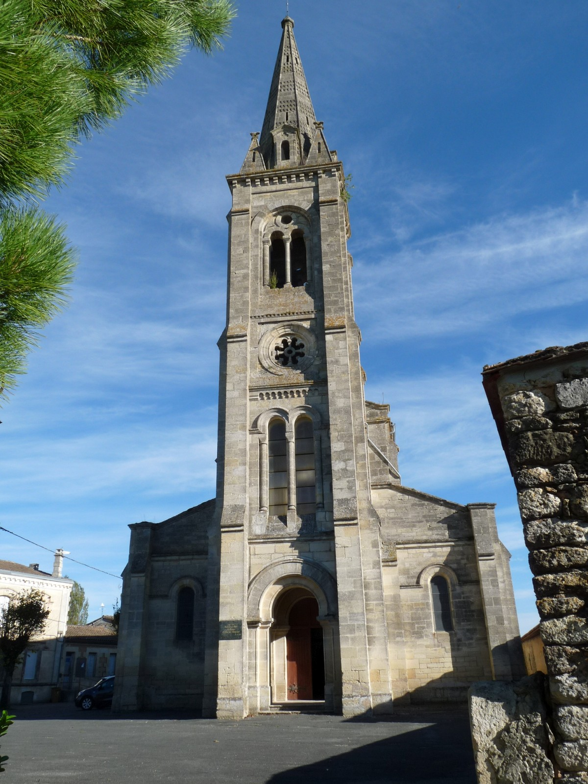 Eglise de Saint-Paul, Gironde, France